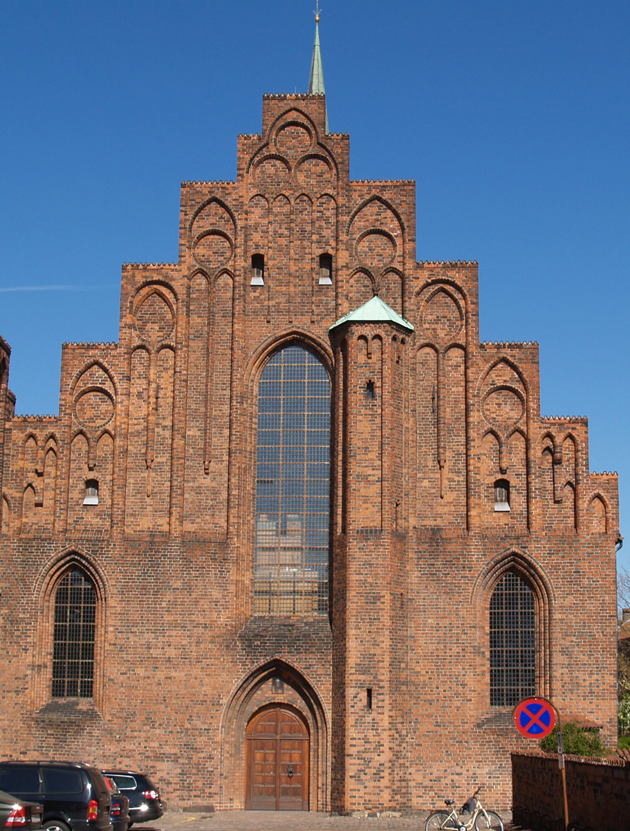 Sankt Mariæ Kirke Helsingør